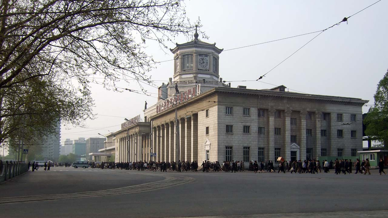 Pyongyang station, North Korea